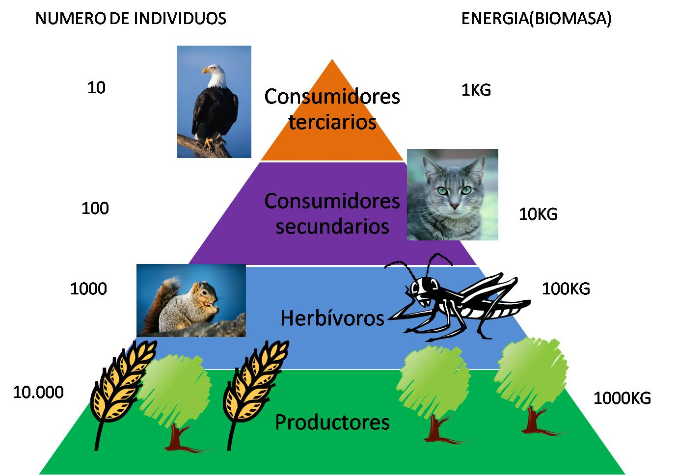 Una pirámide alimenticia sencilla.